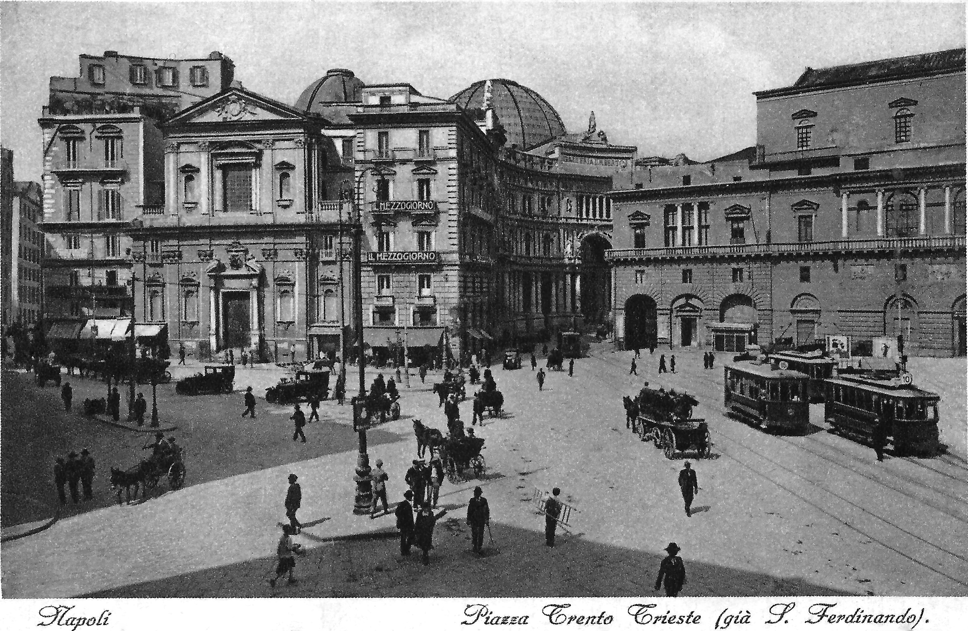 Postkaart van Piazza Trieste e Trento in Napels waarschijnlijk in de 1920s. Tramlijn 10 en 15